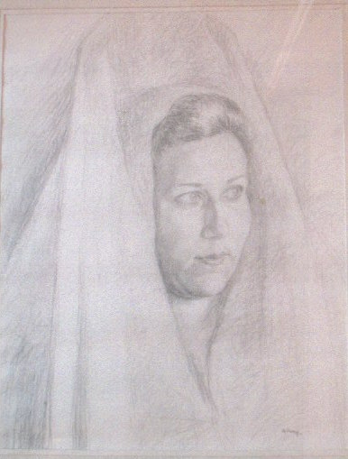 tableau